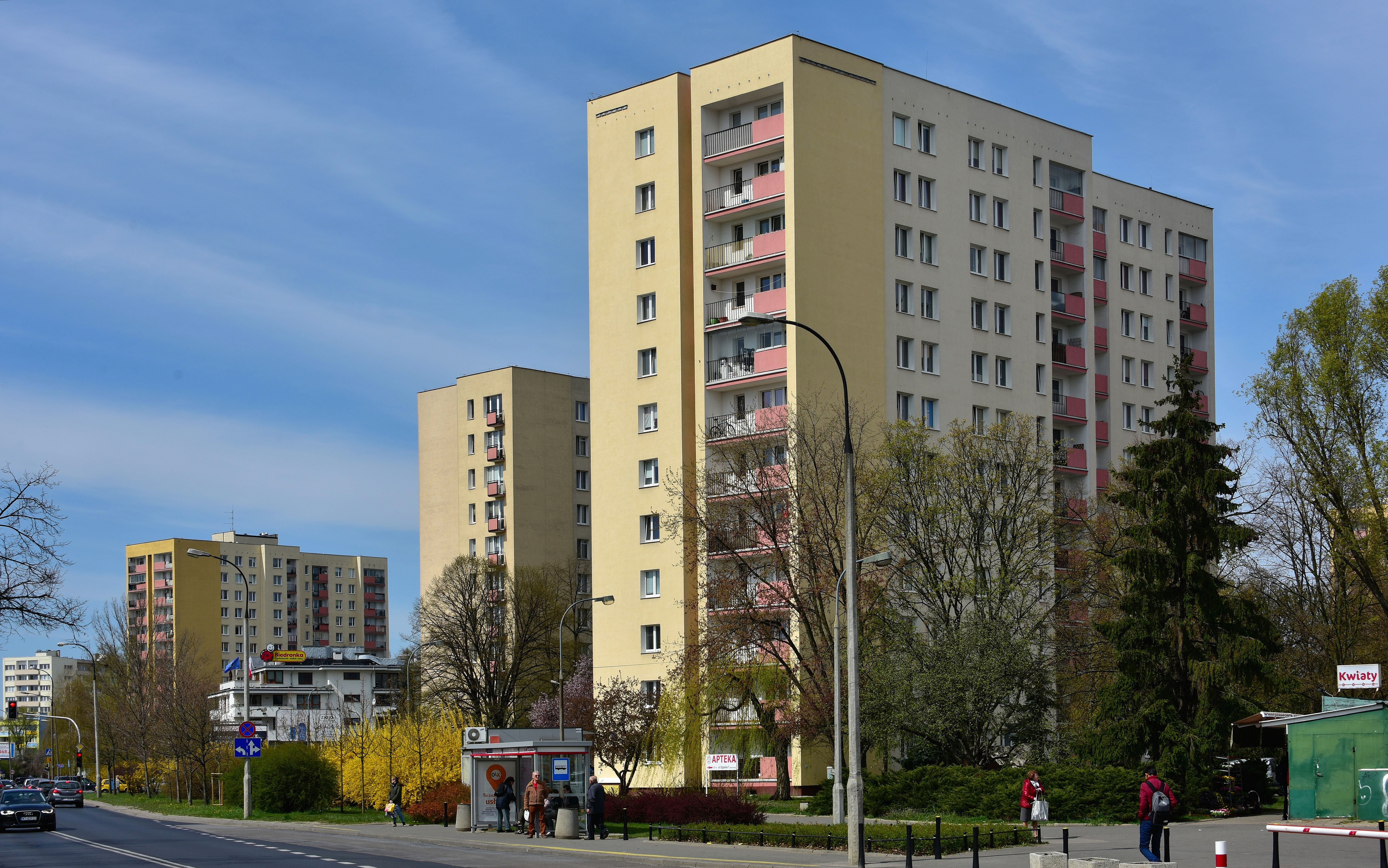 Ulica Egipska w Warszawie